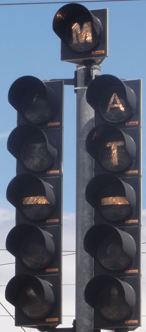 Signal am östlichen Bahnsteigende von Heidelberg Betriebshof kurz vor dem Wechsel auf F1.